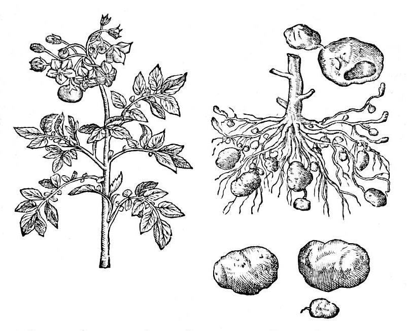 Représentation de la pomme de terre (Solanum tuberosum) par Charles de l'Écluse (Carolus Clusius), Rarorium Plantarum Historia - 1601